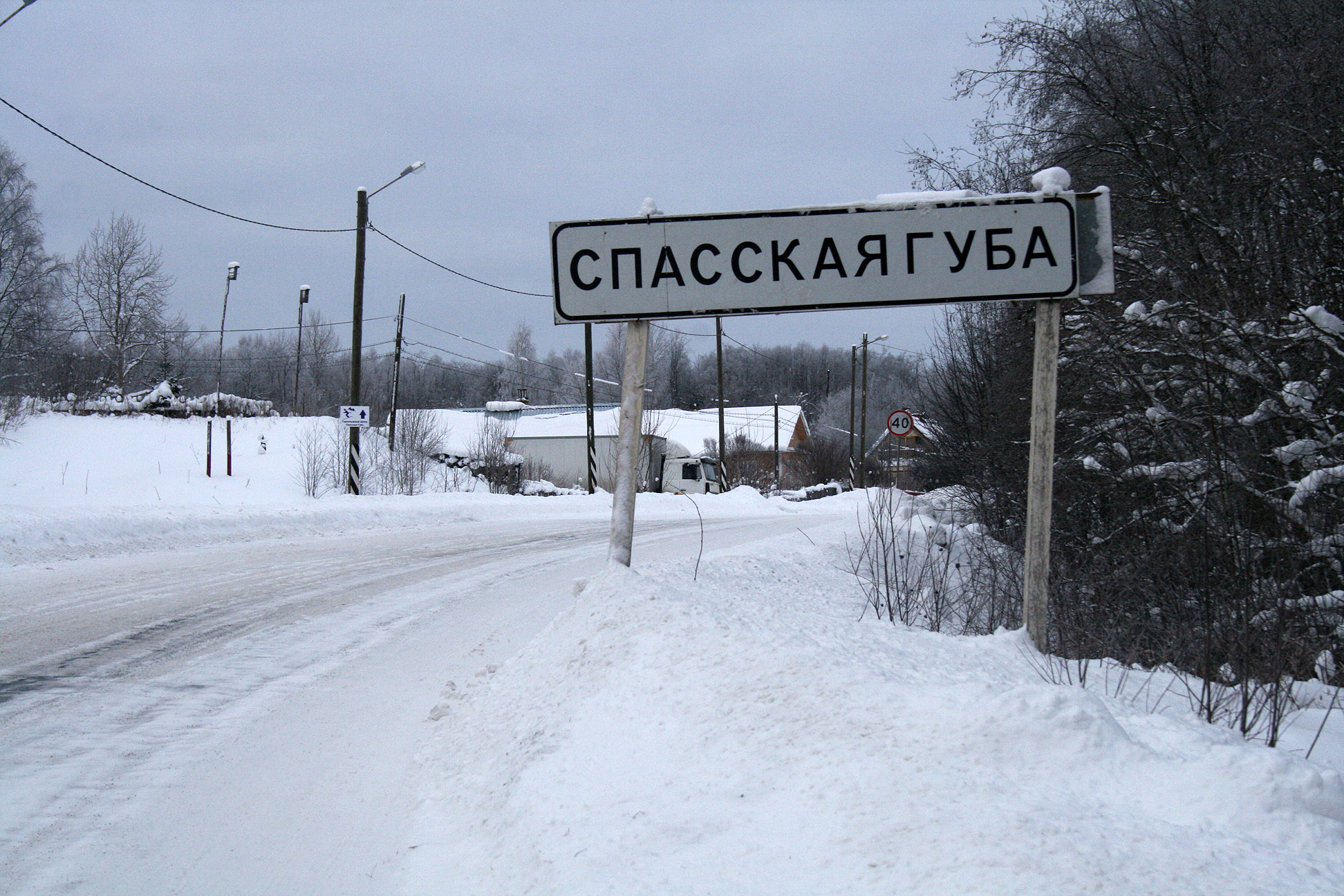 Въезд в село Спасская Губа с южной стороны.